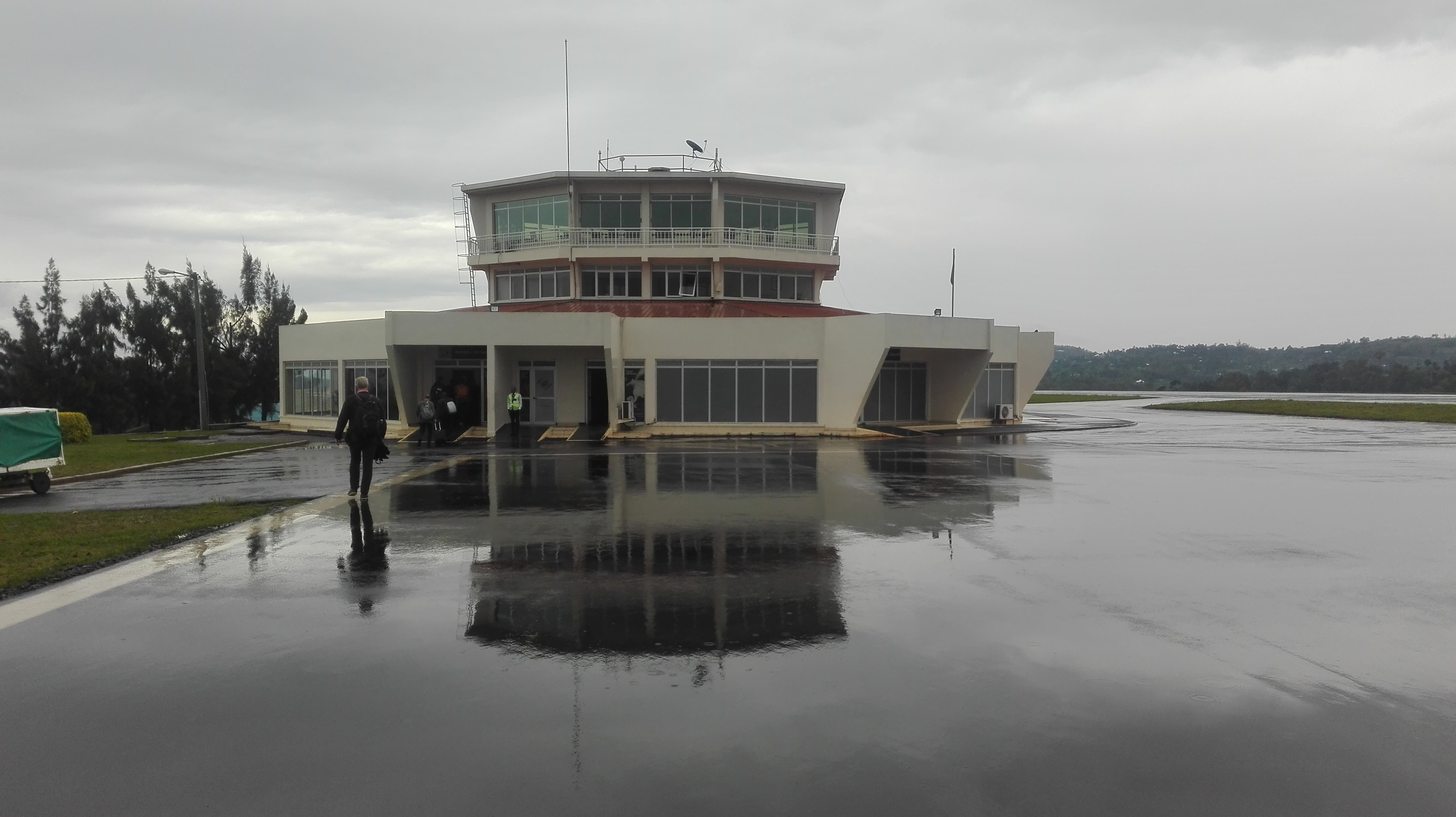 Kamembe lufthavn sett fra rullebanen.